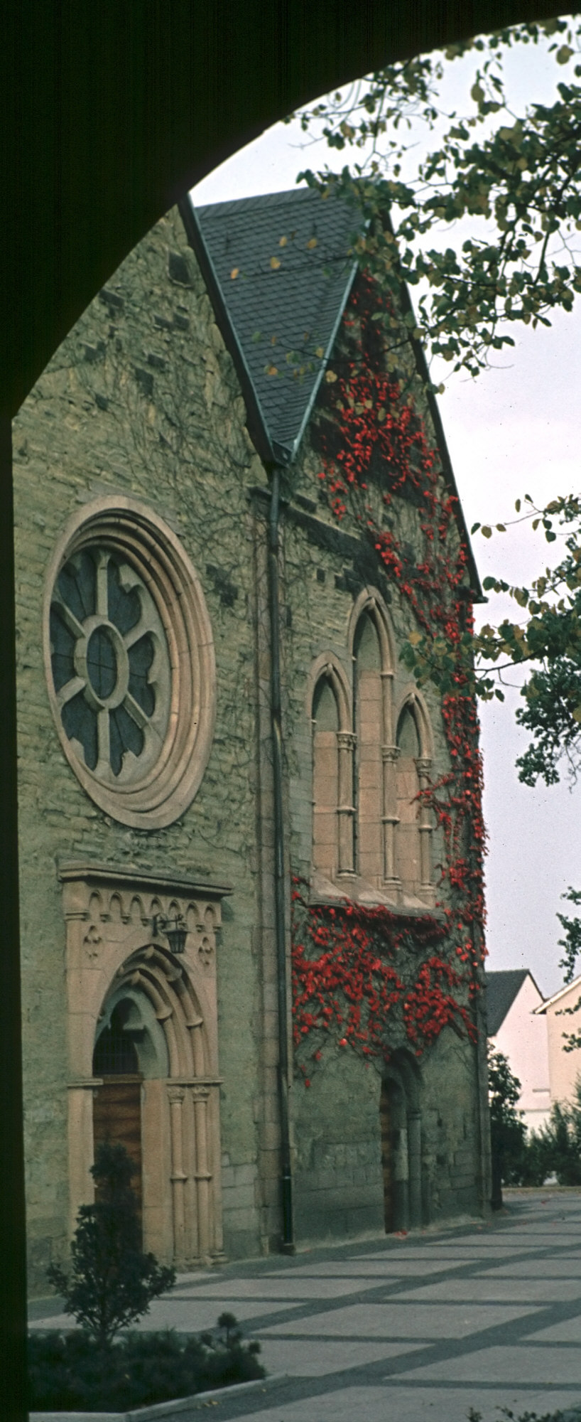 Margaretenkirche Methler. Ausschnitt aus einem Dia etwa aus dem Jahr 1977, das die fortgeschrittene Verwitterung das Anröchter Grünsandsteins zeigt